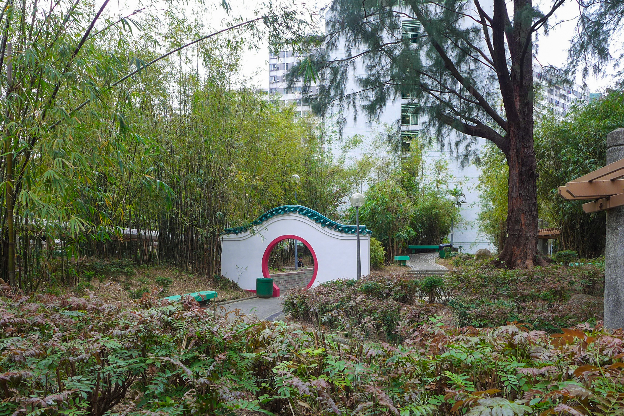 Butterfly Estate Chinese Garden